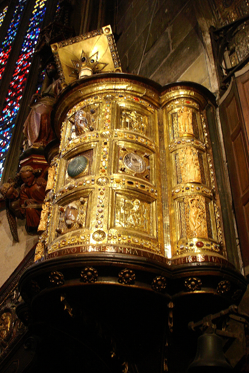 Heinrichskanzel im Aachener Dom